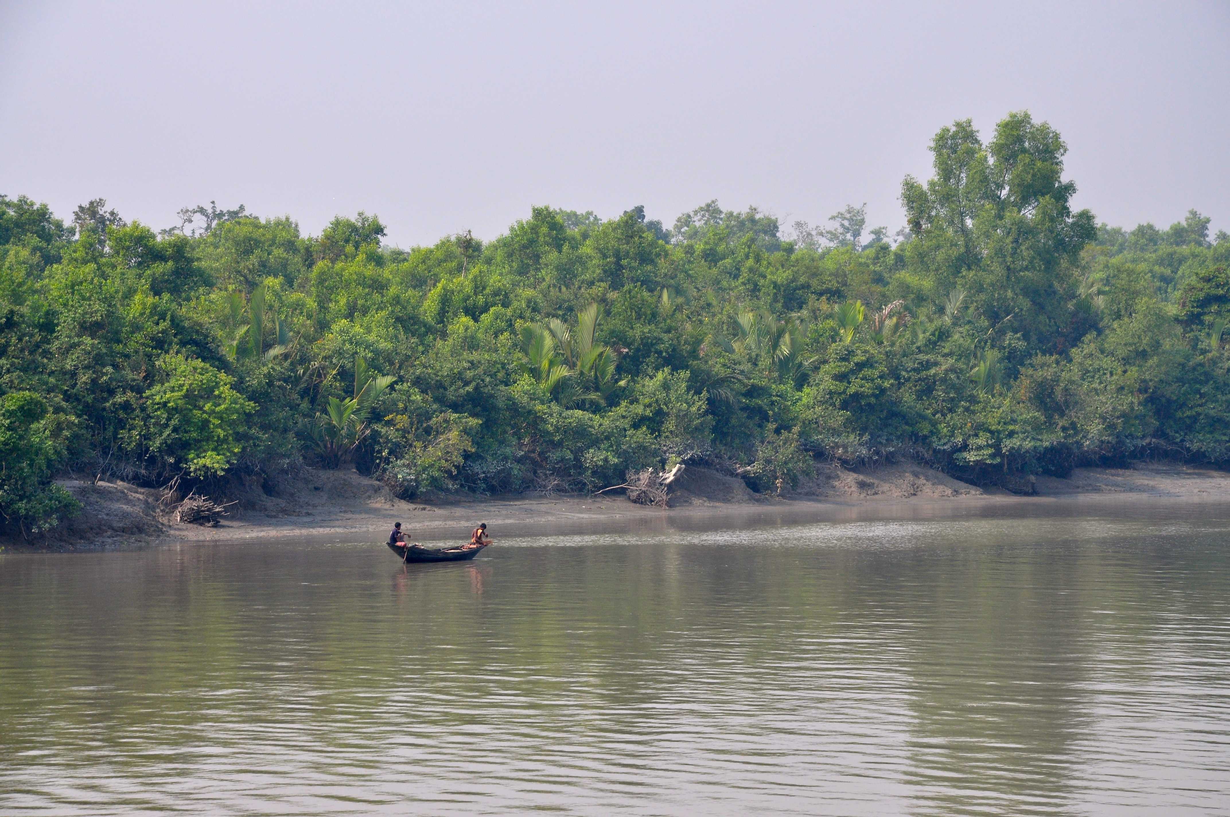 Ein Fischerboot in den Sundarbans von Bangladesch